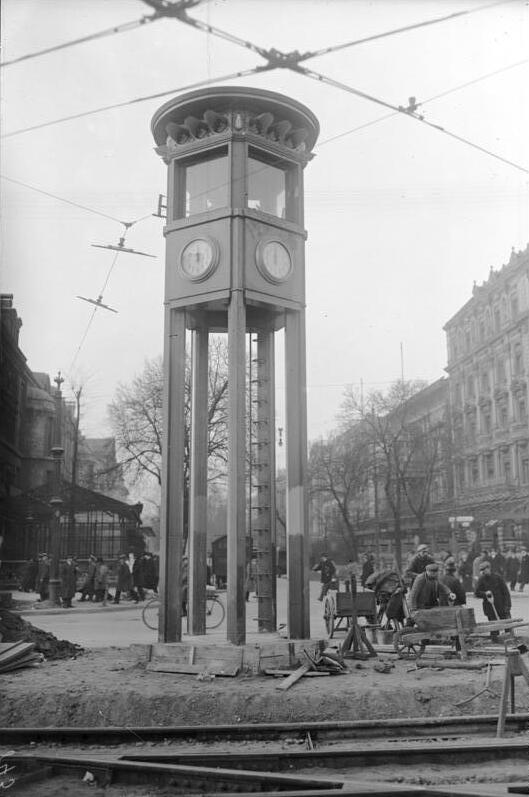 Der neue Verkehrsturm auf dem Potsdamer Platz in Berlin ist fertiggestellt und wird dieser Tage in Betrieb genommen werden. Der neue Verkehrsturm in seiner jetzigen Gestalt.